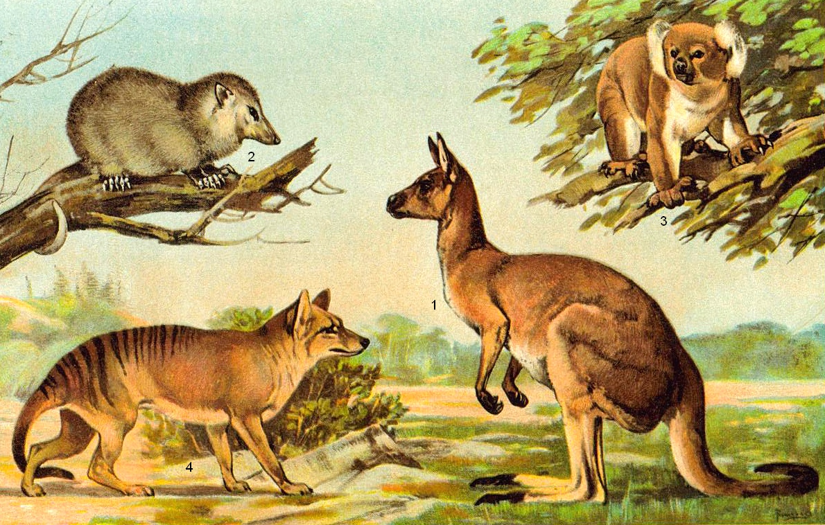 Painting